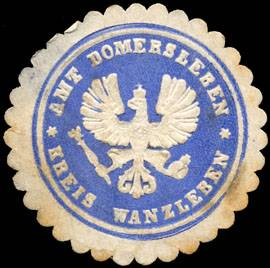 Sealing stamp Title: Amt Domersleben - Kreis Wanzleben Description: blau, weiß, geprägt Place: Domersleben size: 3 cm